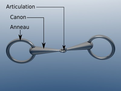 Schéma annoté d'un mors simple à anneaux.